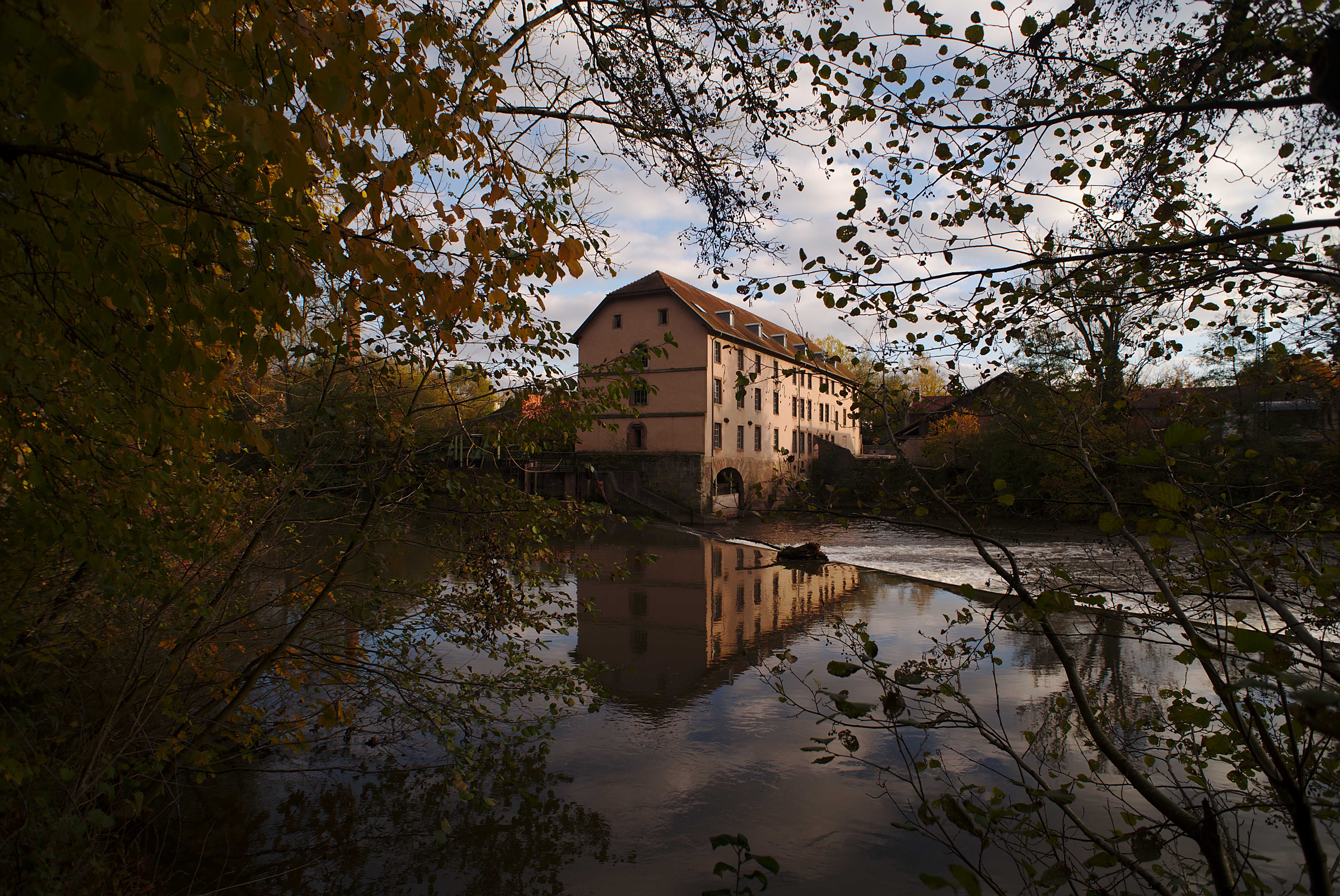 Eine Mühle an der Blies von dem Blies-Grenz-Weg aus.